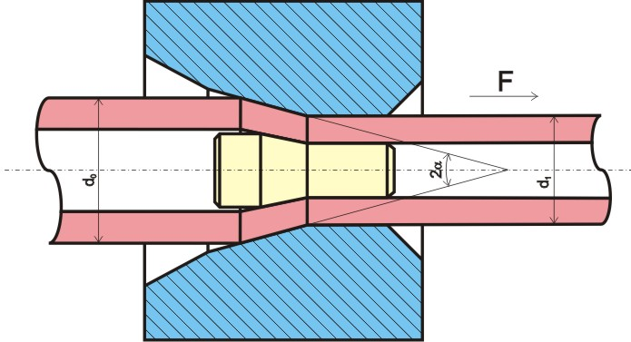 wire drawing